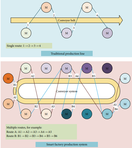 La diferència entre l'automatització tradicional i la Smart Factory